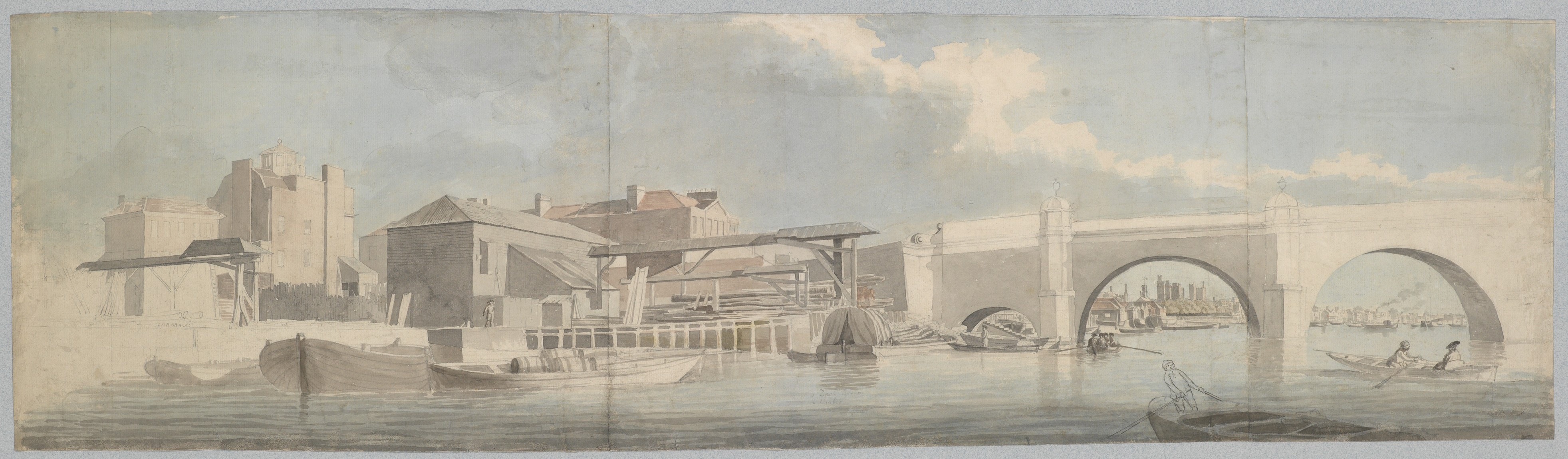 Drawing; Drawings